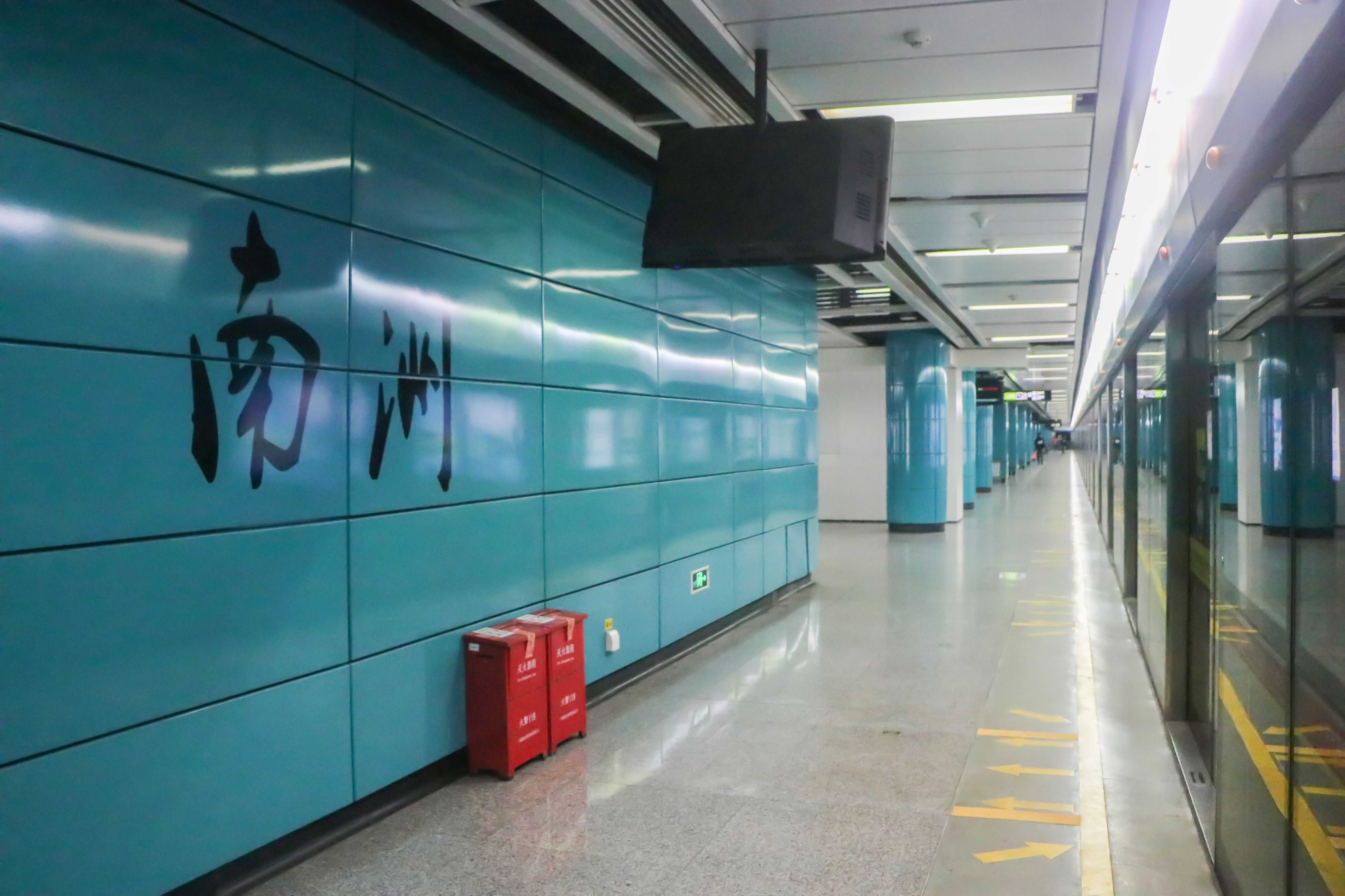 广州地铁南洲站